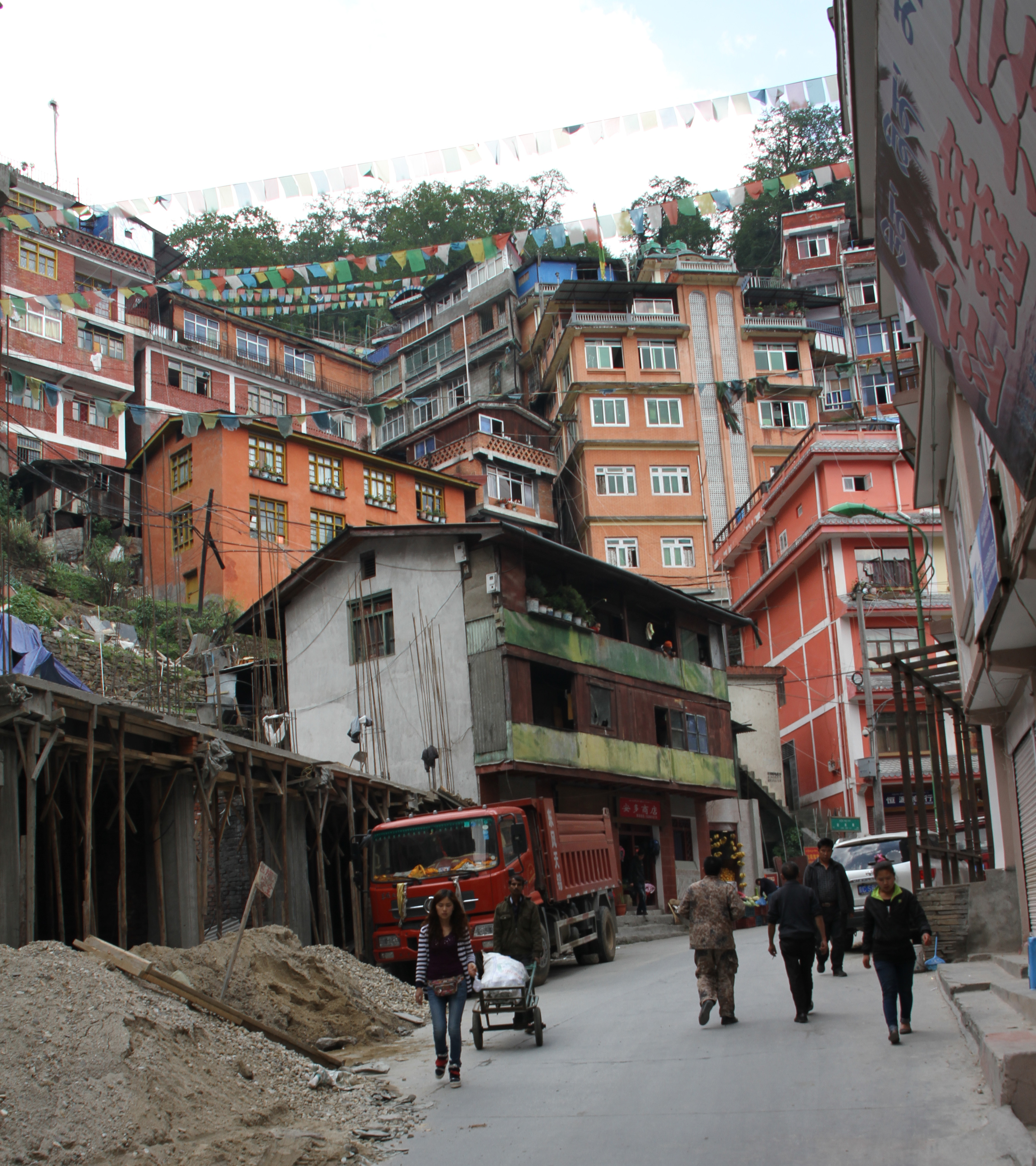 Zhangmu in Tibet